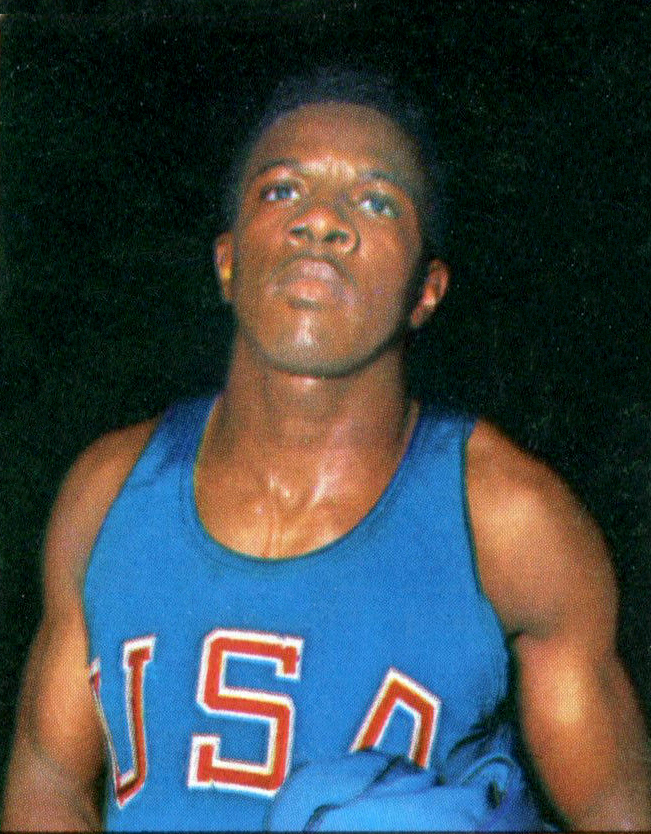 CAMPIONI DELLO SPORT 1968/69 - n. 44 - McCULLOUCH